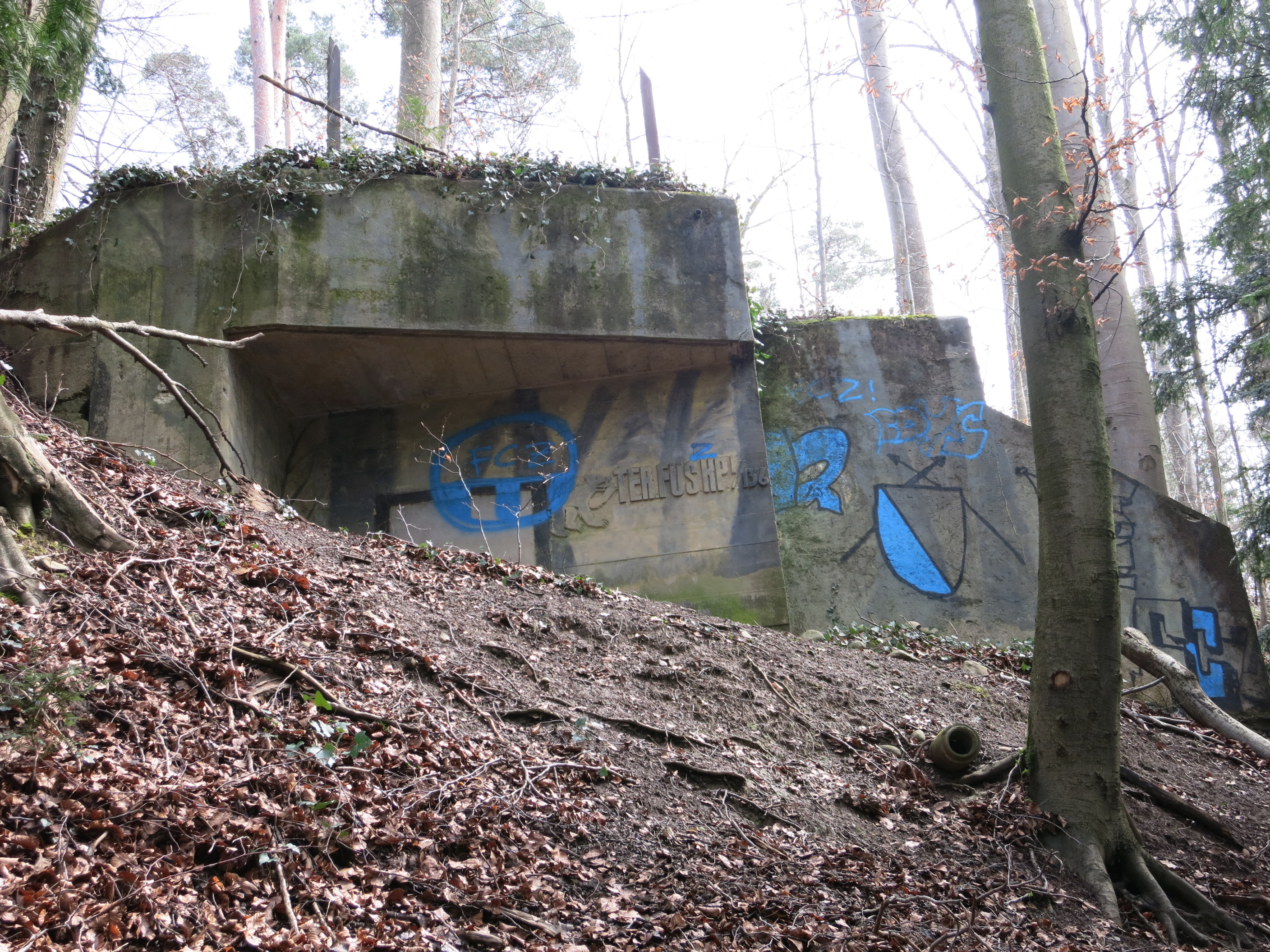 Bunker Entlisberg, Zürich-Wollishofen, Schweiz